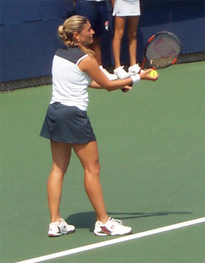 Elena Tatarkova